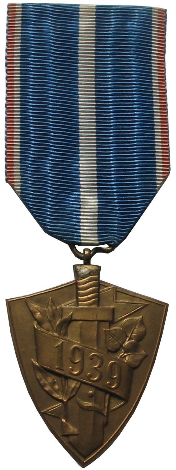 Pamätná medaila Za obranu Slovenska v marci 1939 pre vojakov vojnovej Slovenskej republiky.